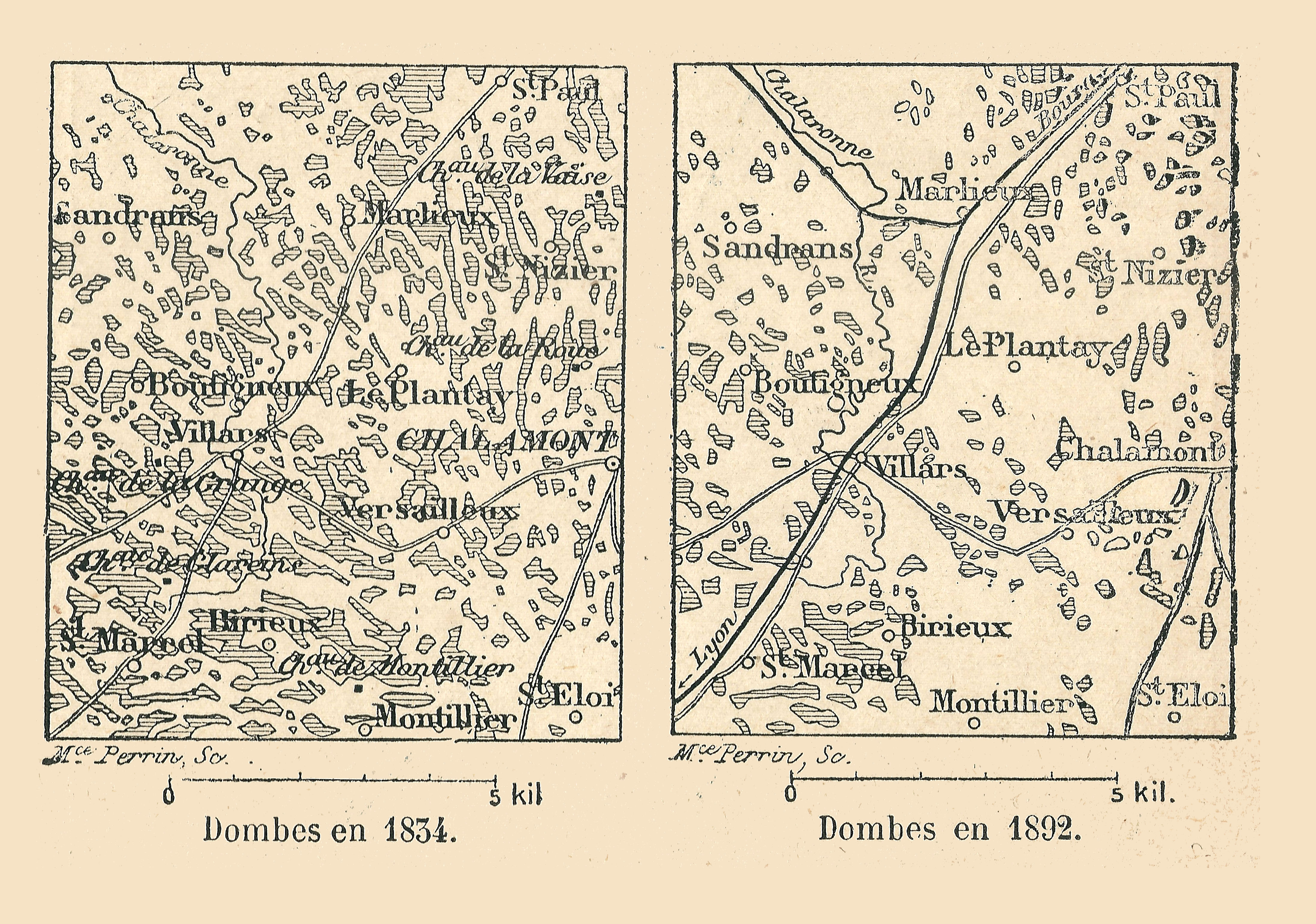 Carte de Franz Schrader